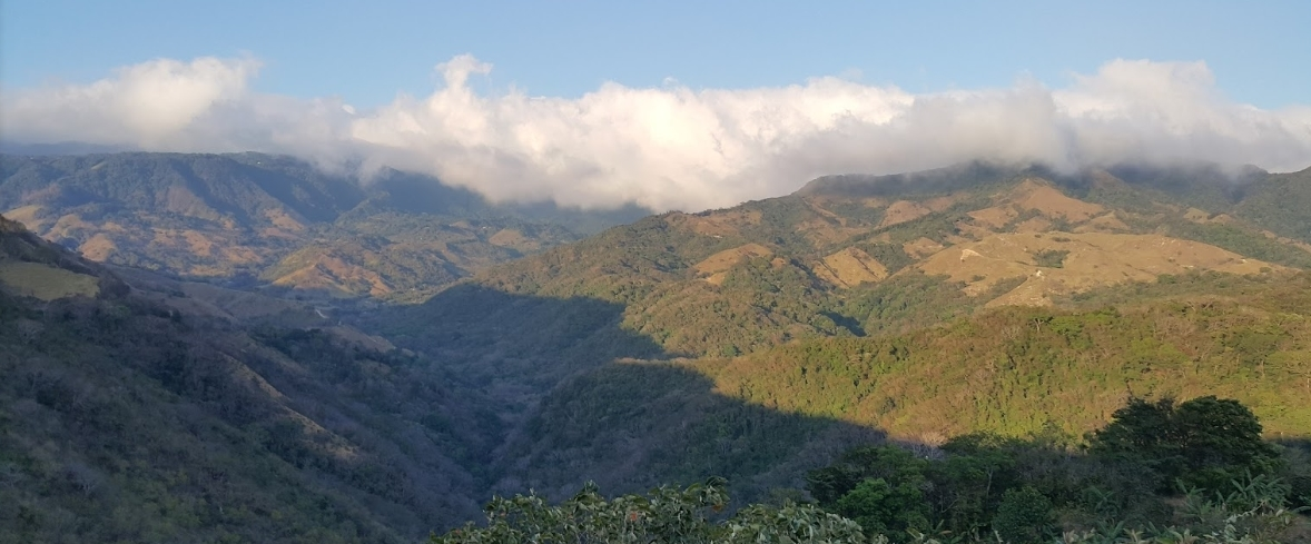 Montañas en el distrito de San Luis, cantón de Turrubares. Costa Rica.